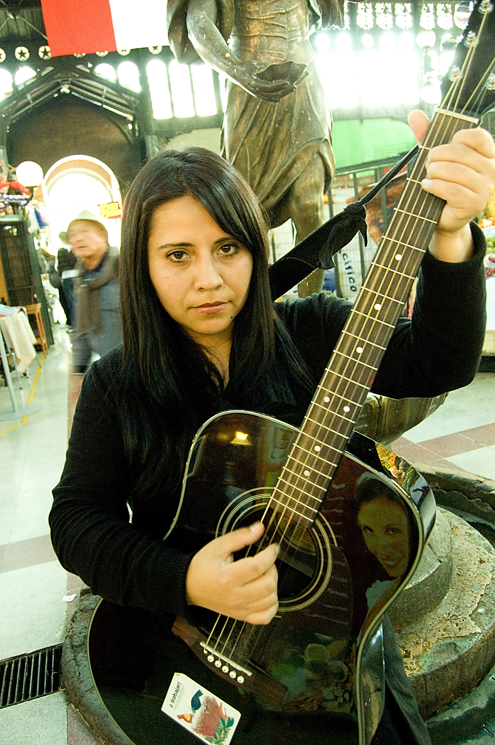 Natalia Molina cantautora chilena